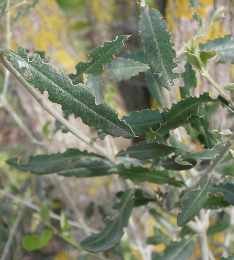 Erosioni semicircolari sul margine delle foglie dei polloni di olivo